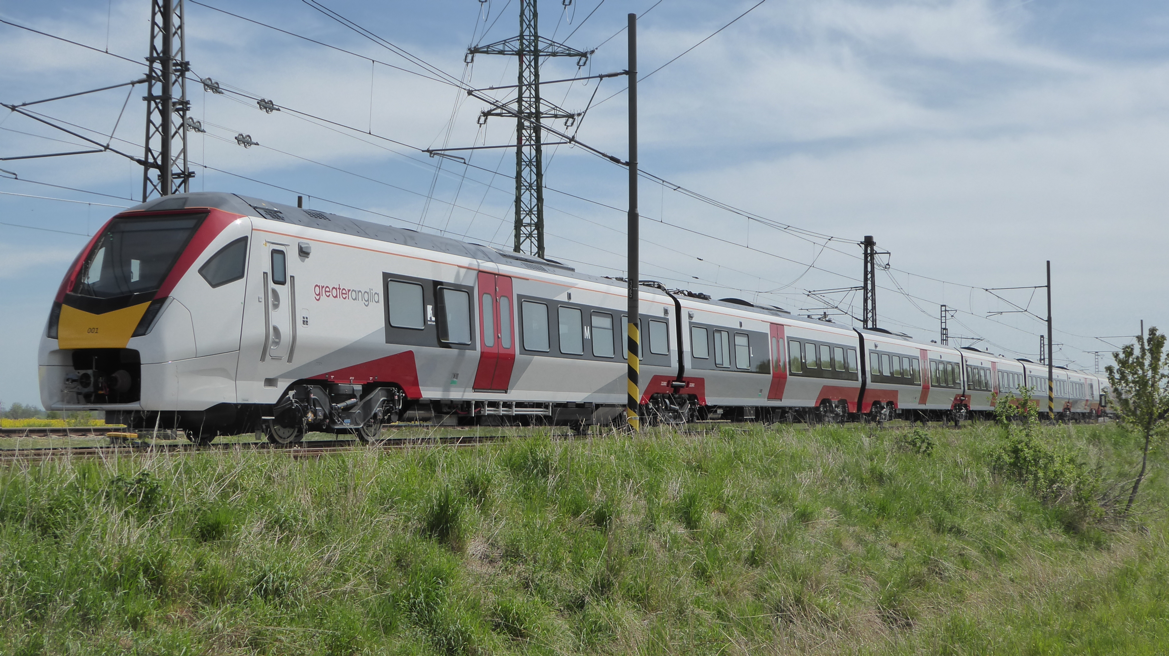 British Rail Class 745 auf dem Eisenbahnversuchsring Velim (CZ). An einem Fenster hängt ein Blatt mit Informationen in deutscher Sprache:Technische AnschriftL-4377 EMU12 UK East AngliaWagen AFahrzeug: 94700312103-6Bremsgewicht: 442 t 120 %Gewicht: 370 tLänge: 234 m